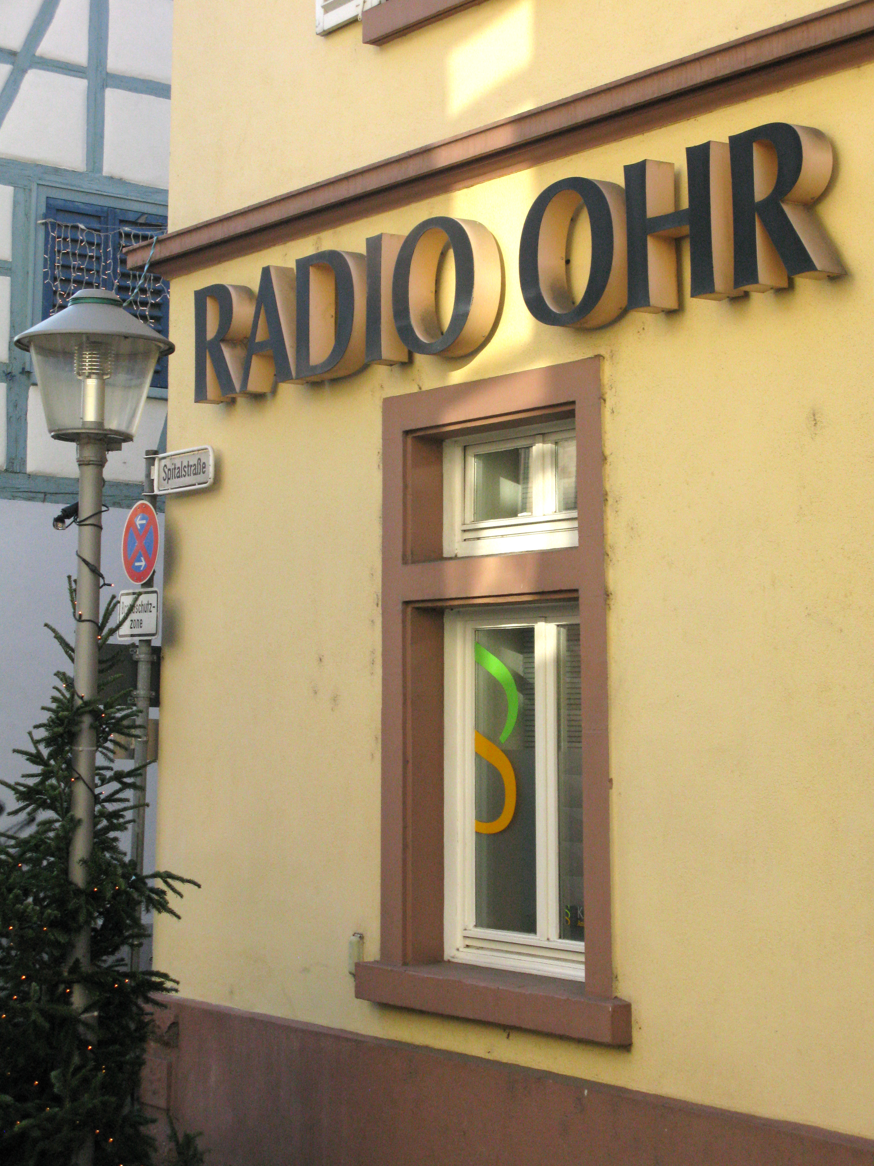 Sitz des Hitradio Ohr in der Spitalstraße in Offenburg